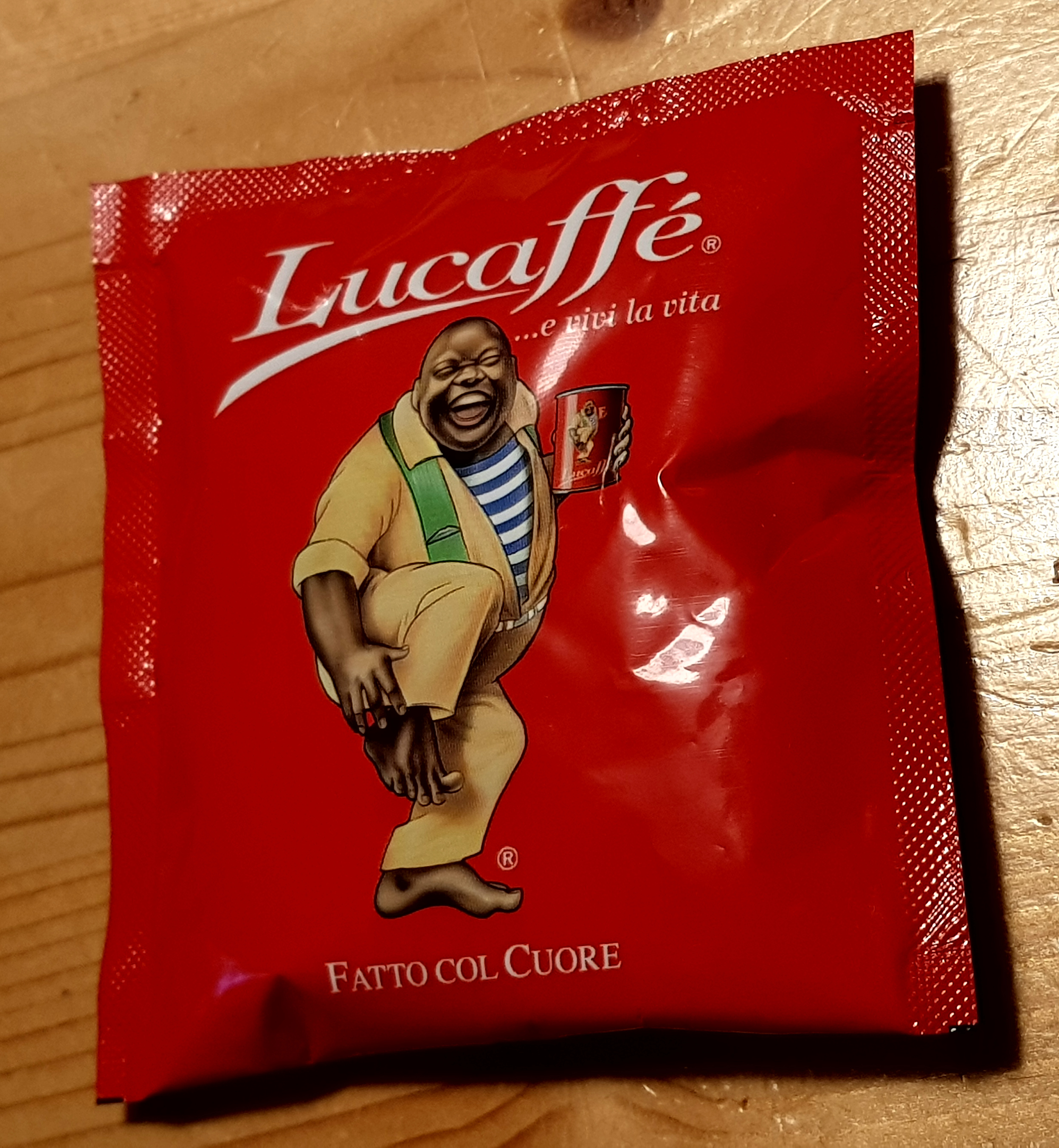 Kaffeepad der italienischen Firma Lucaffe für ESE-Maschinen